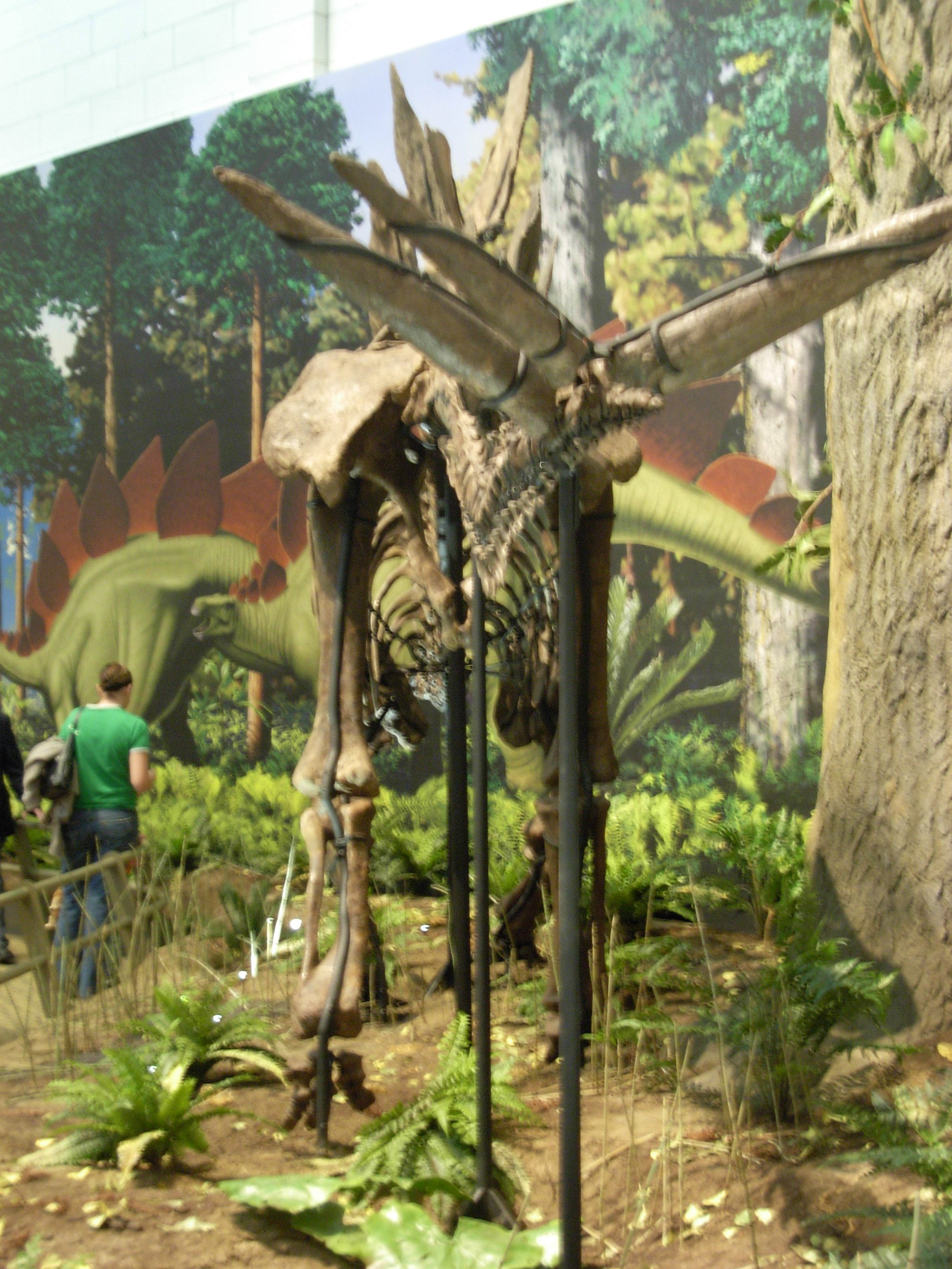 Stegosaurus ungulatus.